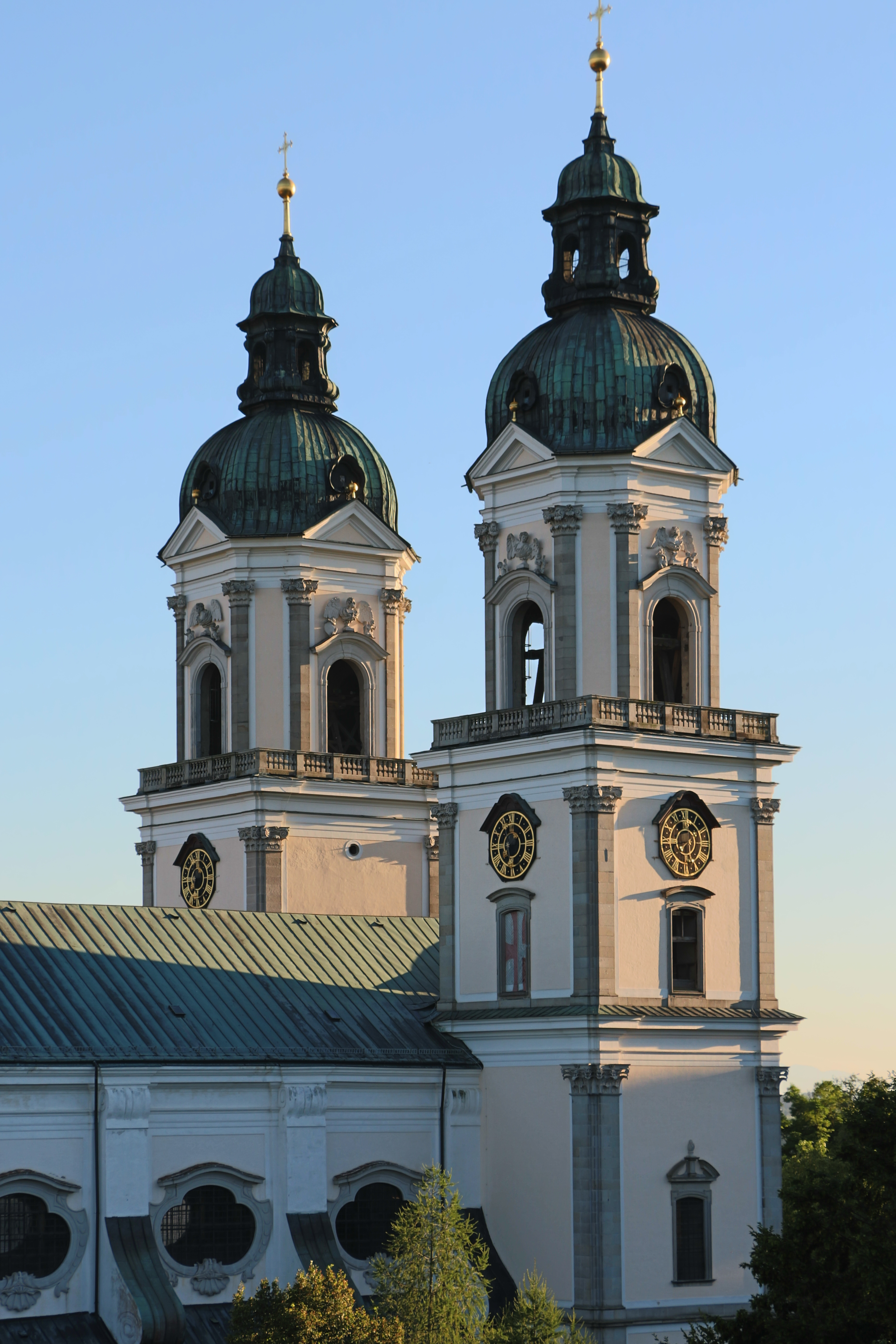 Gesamtanlage Augustinerchorherrenkloster